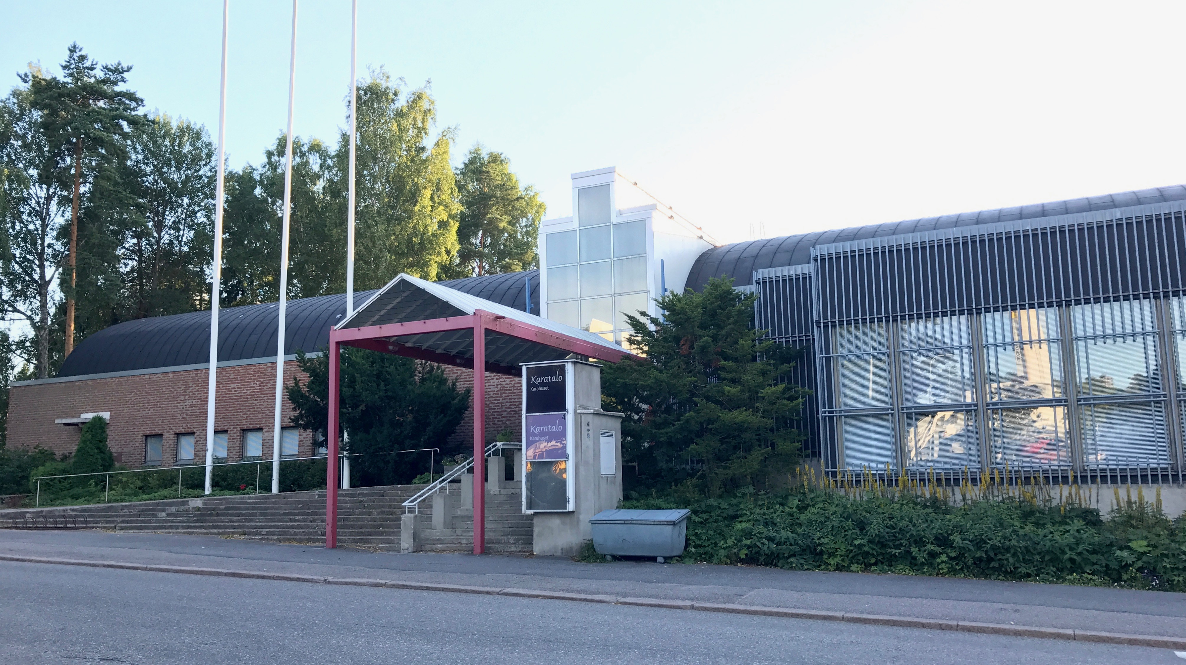 Karatalo on Espoon kaupungin tapahtuma- ja kulttuuripalveluiden, nuorisopalveluiden ja työväenopiston hallinnassa oleva talo. Kotkatie 4, Espoo.